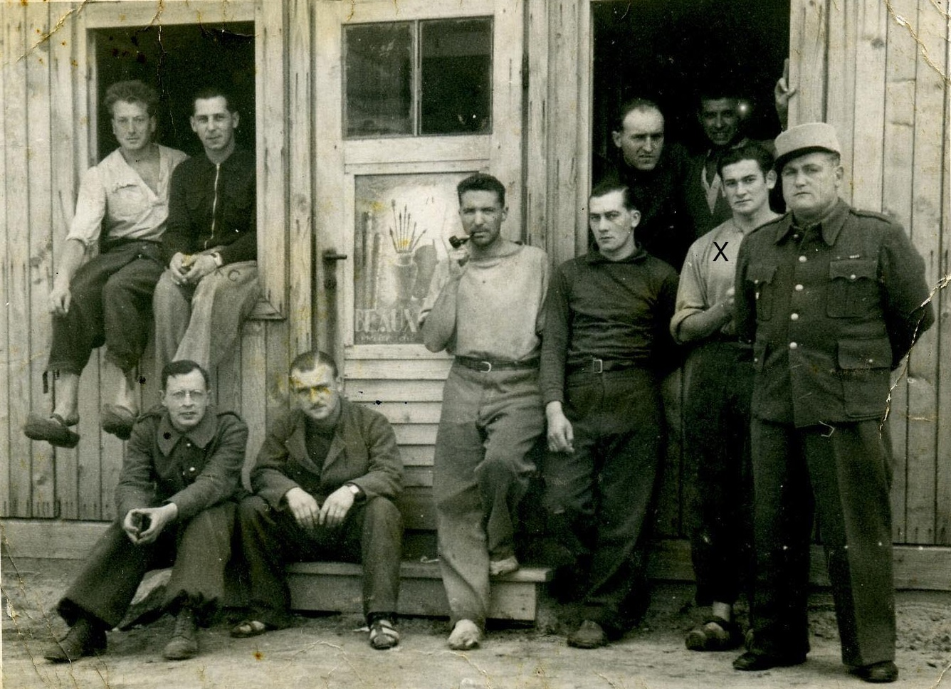 Le sculpteur Marcel Mayer (croix) devant le baraquement des artistes du stalag 325 - camp de représailles des évadés français à la citadelle de Lemberg (Lwow) ancienne Pologne